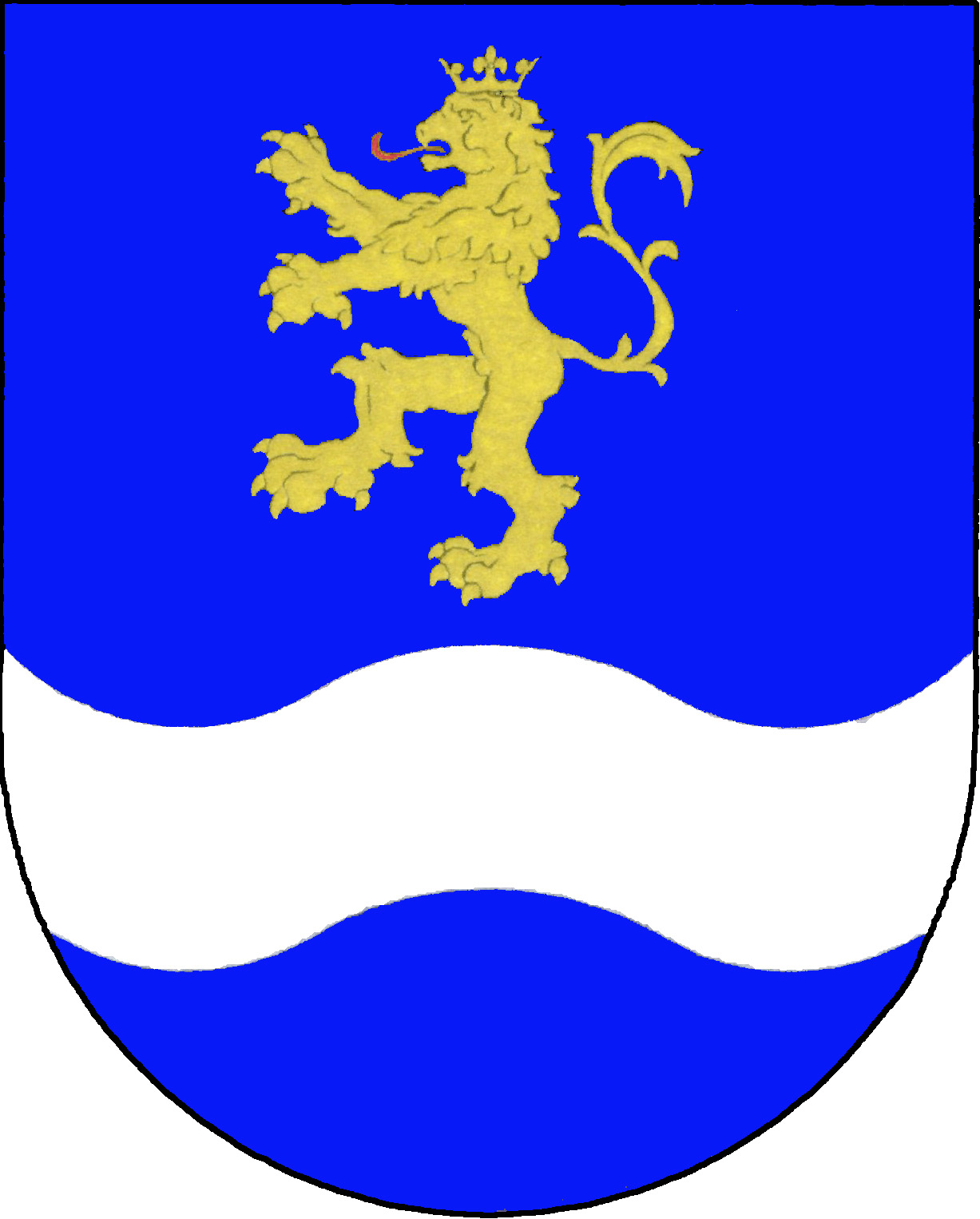 Znak obce Chocerady